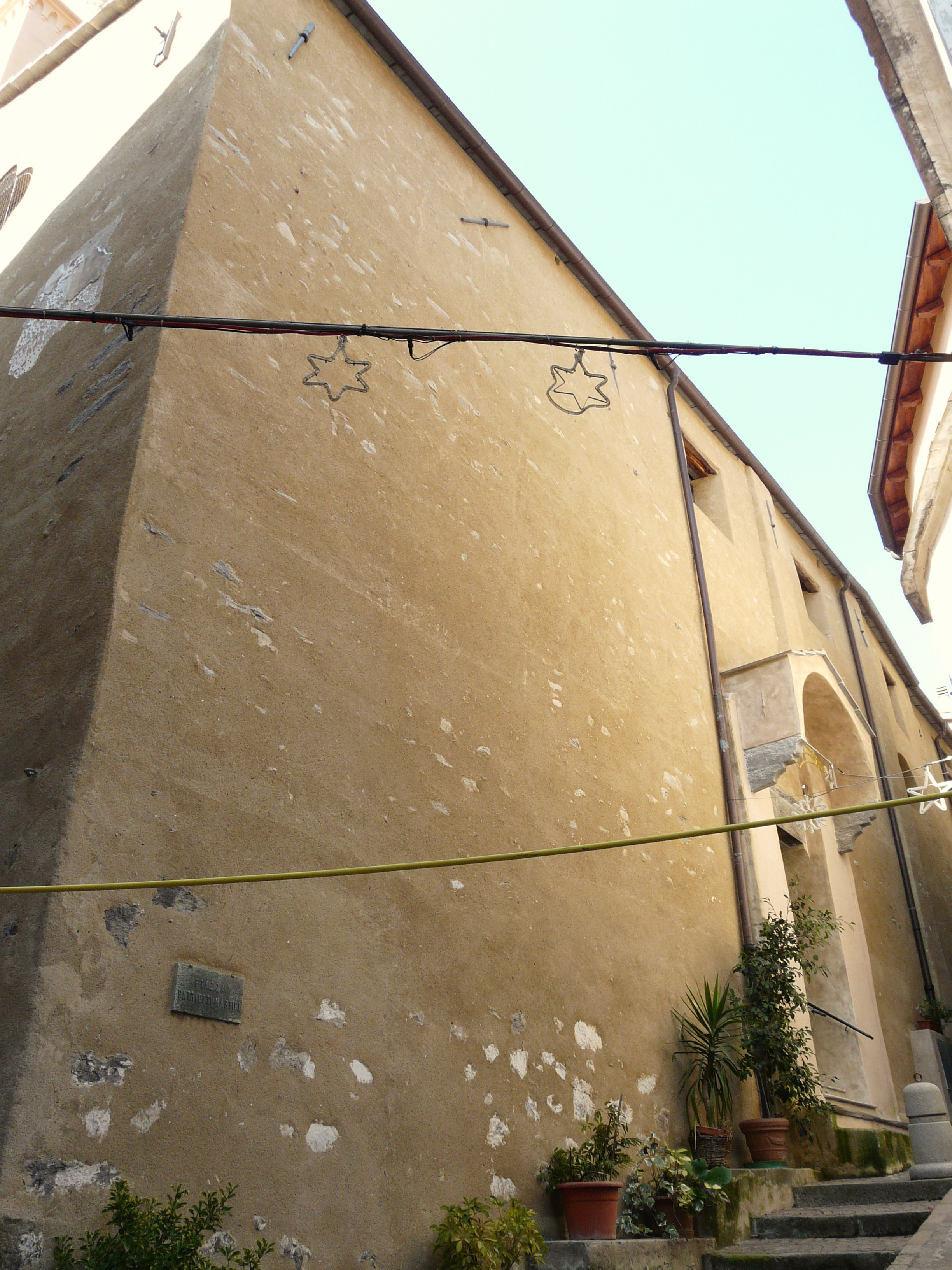 Chiesa di Santo Stefano, Rocchetta Nervina, Liguria, Italia